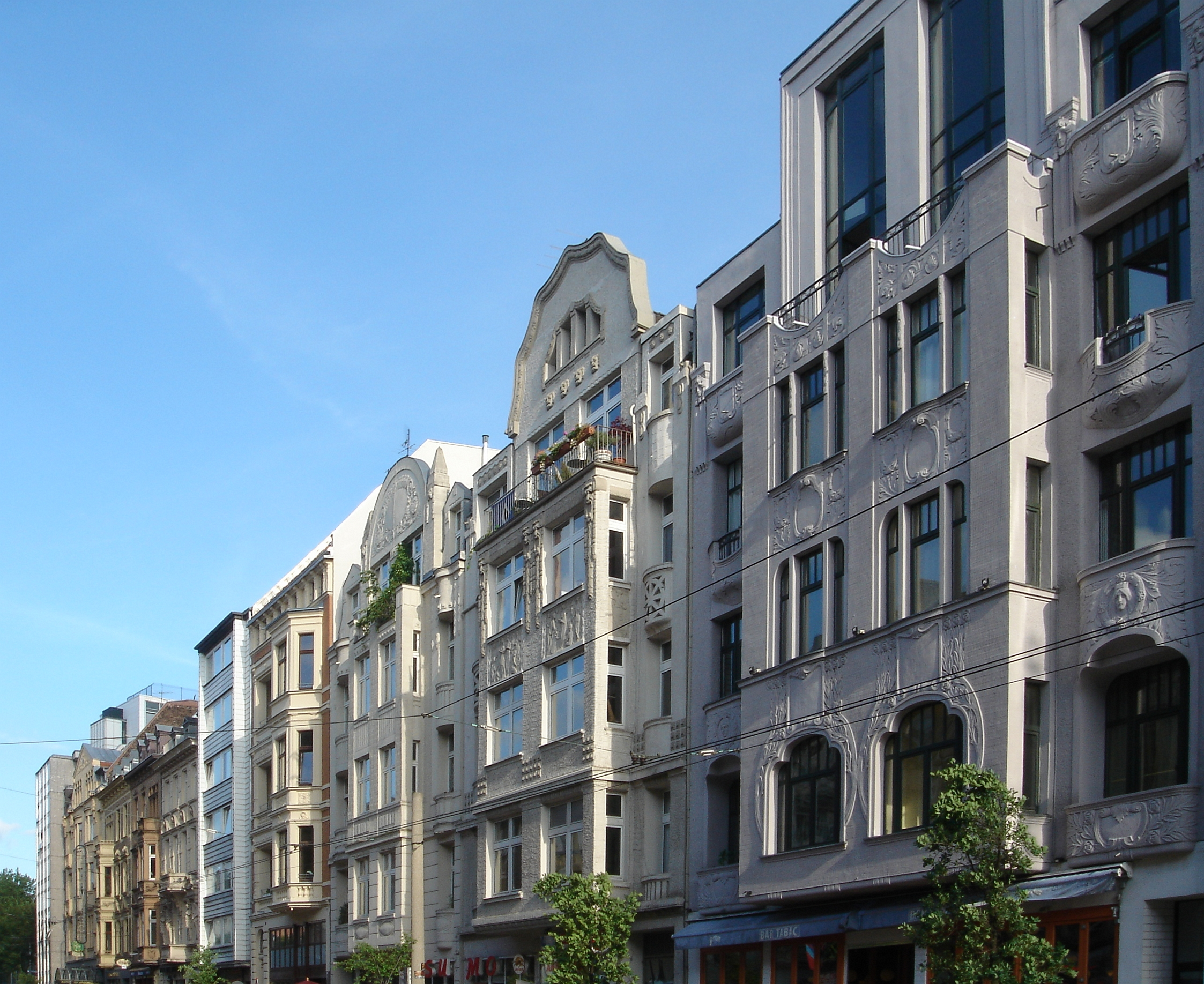 Südseite der Aachener Straße in Köln, unmittelbar hinter dem Rudolfplatz. Im Vordergrund Bürgerhäuser aus der Jugendstilzeit.